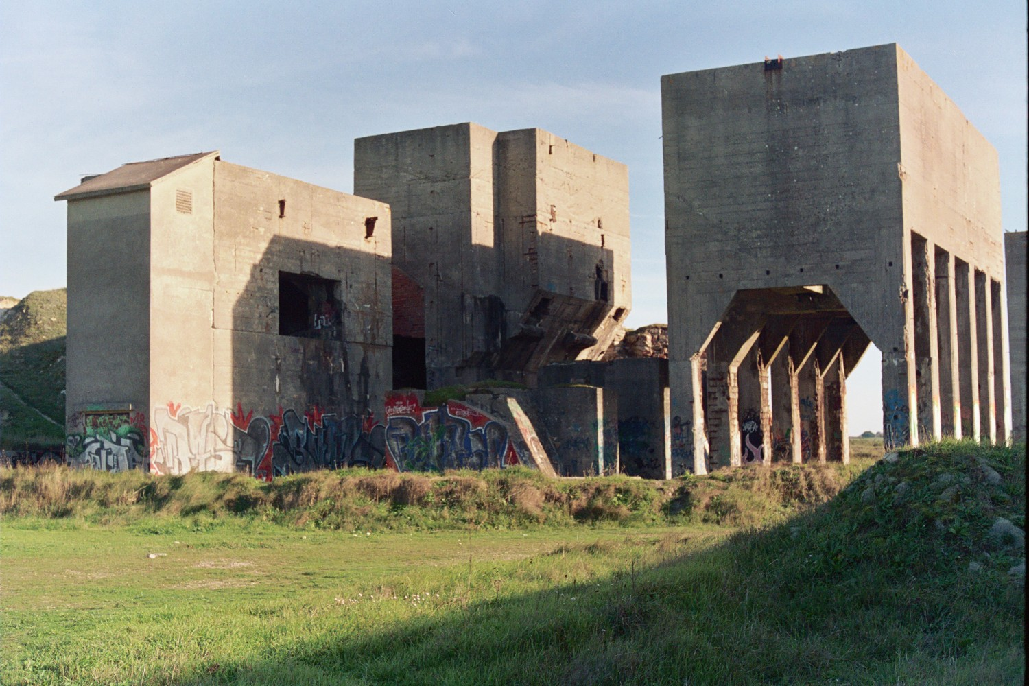 Batiments de production